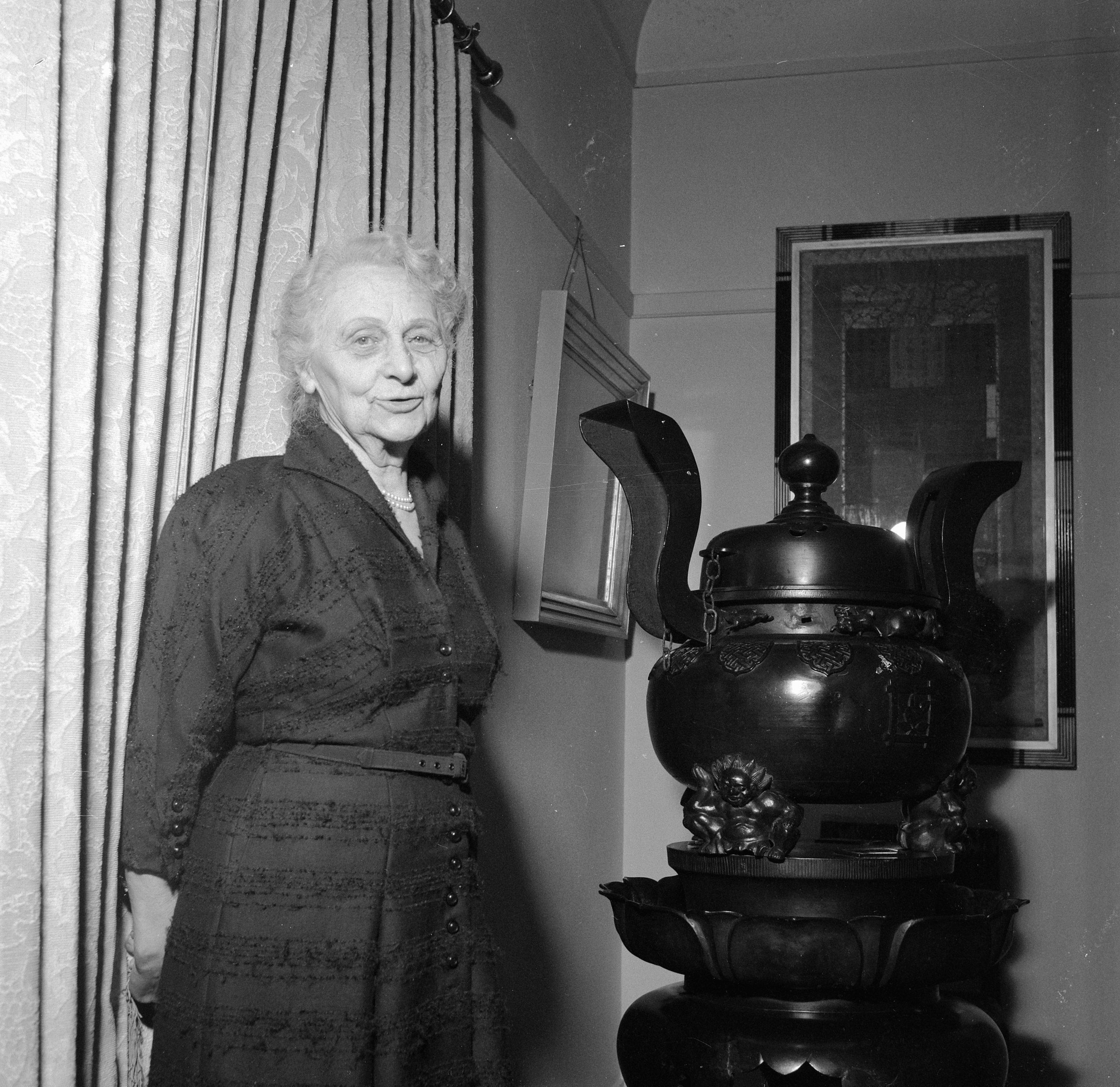 Jo Bauer-Stumpff kort voor haar 89e verjaardag.